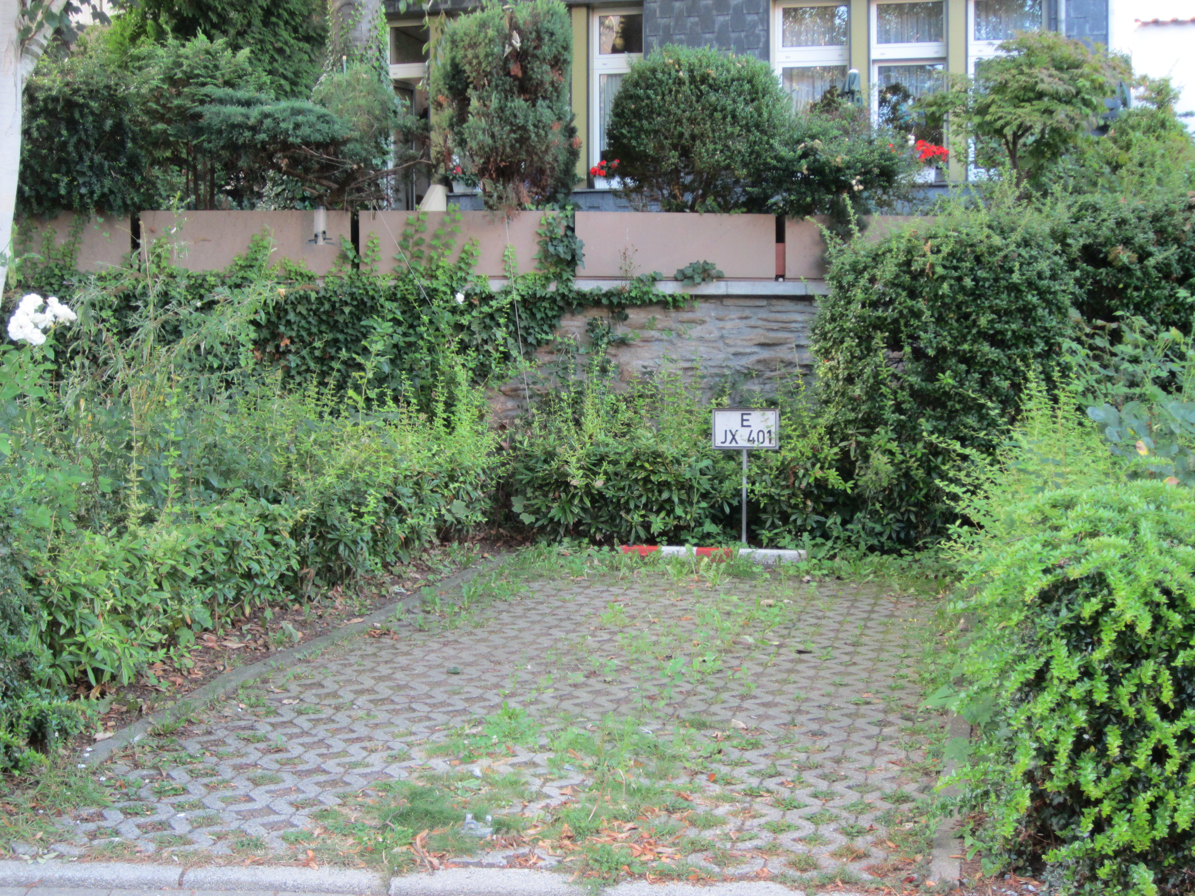 Reste der Stadtmauer von Essen-Steele, von der Grendmauer aus gesehen, hinter dem Haus Alte Zeilen 17